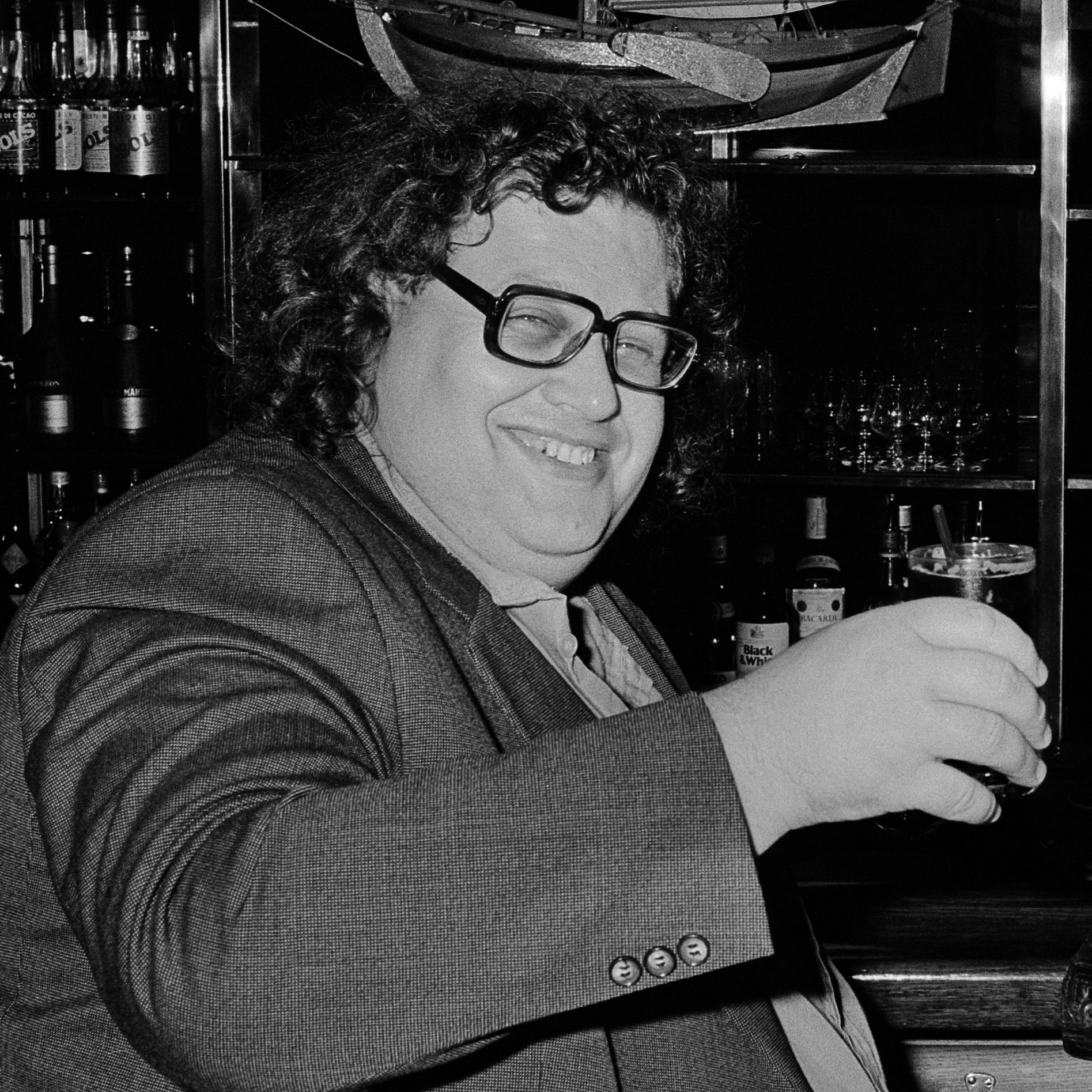 Harry Thomas (l) en Freddy Quin , opdracht Limburgs Dagsblad 6 september 1977